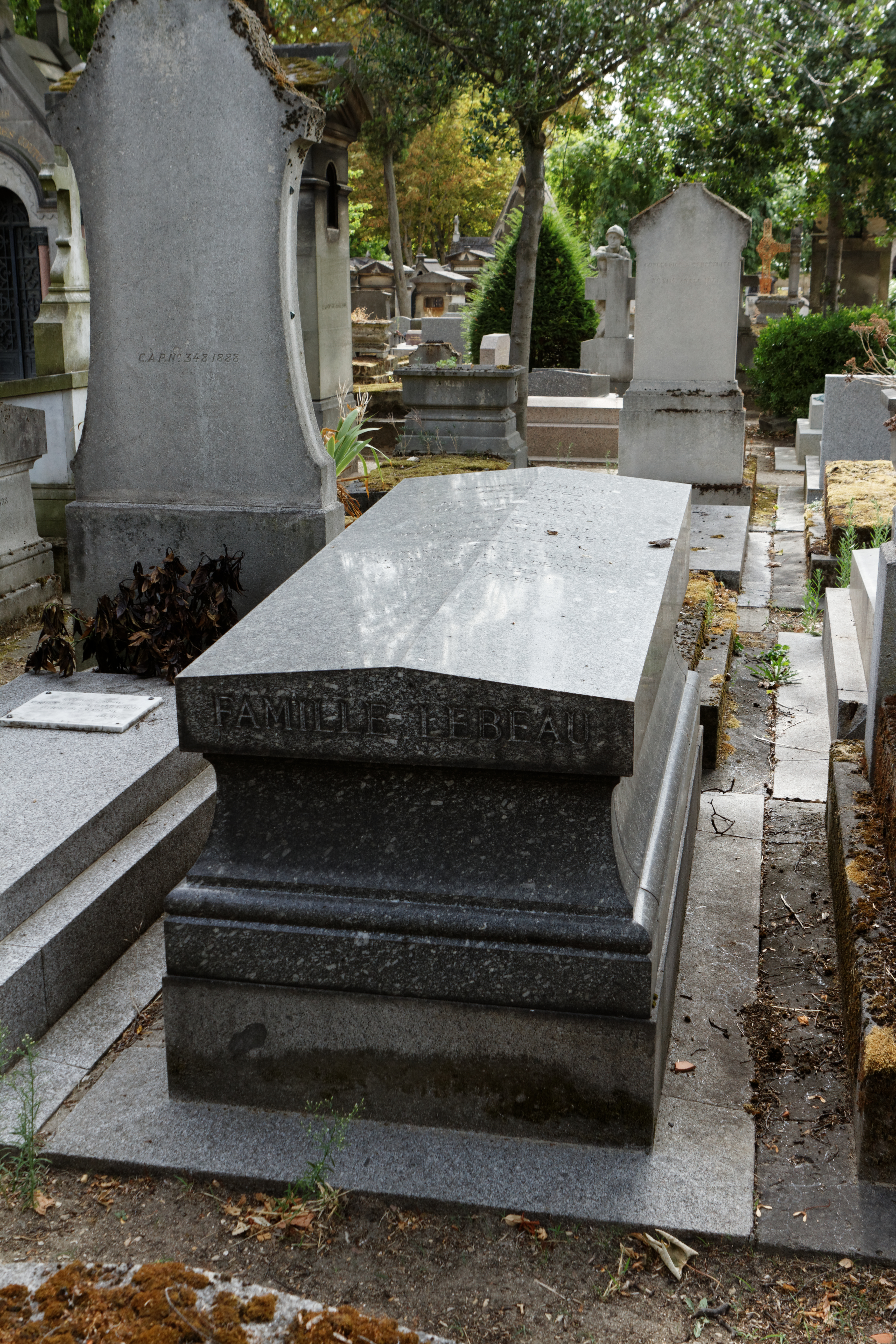 Sépulture de Paul Lebeau (1868-1959), chimiste et académicien des sciences. Il est l'un des principaux artisans de l'élaboration des moyens de protection contre les gaz de combat pendant la Première Guerre mondiale.